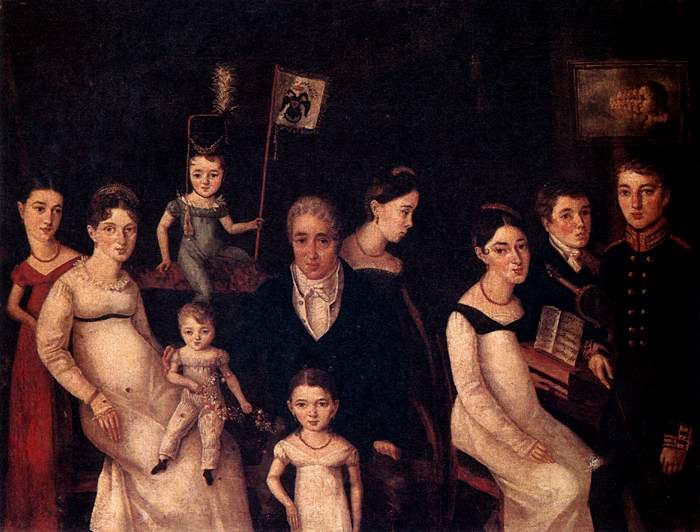 Portrait of the Benua Family. About 1816 Оливье (?) Художник первой половины 19 века Портрет семьи Бенуа Около 1816 В центре сидит глава семейства Леонтий (Луи Жюль) Бенуа — повар-кондитер герцога Монморанси, переселившийся в Россию и ставший придворным метрдотелем. Рядом — его жена Екатерина Андреевна. Их дети (по старшинству) — Жаннет, Михаил (в кадетской форме), Леонтий, Александрина, Елизавета, Елена, Николай и Франсуа. А.Н. Бенуа вспоминал: „Вся семья дедушки изображена целиком на картине, писанной каким-то „другом дома" по фамилии, если я не ошибаюсь, Оливье. Это совершенно любительское произведение, над которым в былое время принято было у нас потешаться... досталось по мне. Но как раз любительский характер этой картины в последующие годы (когда начался культ всякого примитивизма в искусстве, а строгие академические заветы стали постепенно забываться) — возбуждал восторги моих гостей. Иные из них ничего другого на стенах не удостаивали внимания, кроме этого портрета ..."